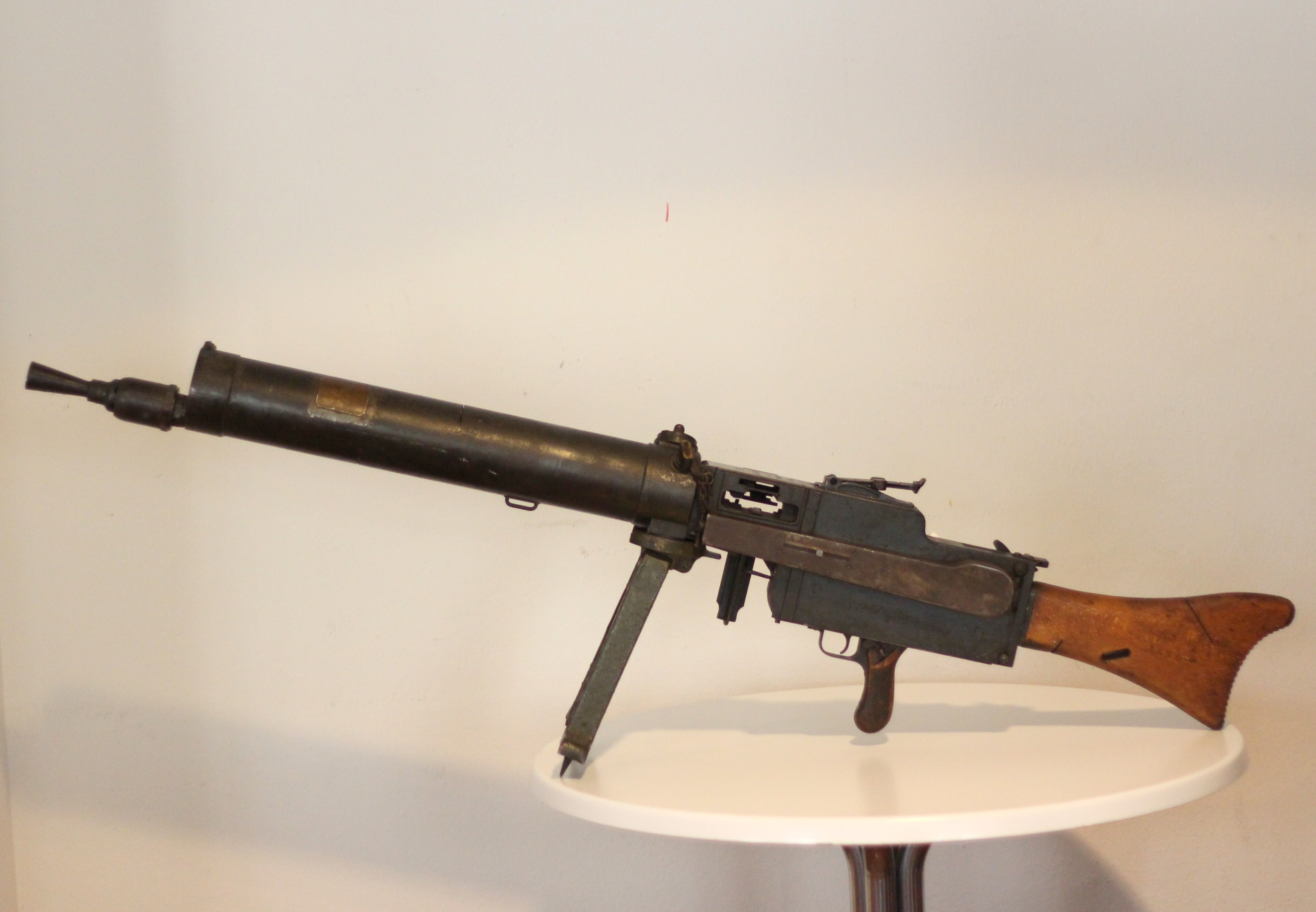 Braunschweigisches Landesmuseum. Wikimedia Deutschland. Juni 2014.